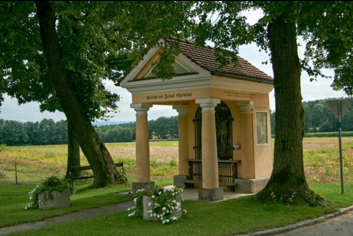 Das Altendorfer Pestkreuz.